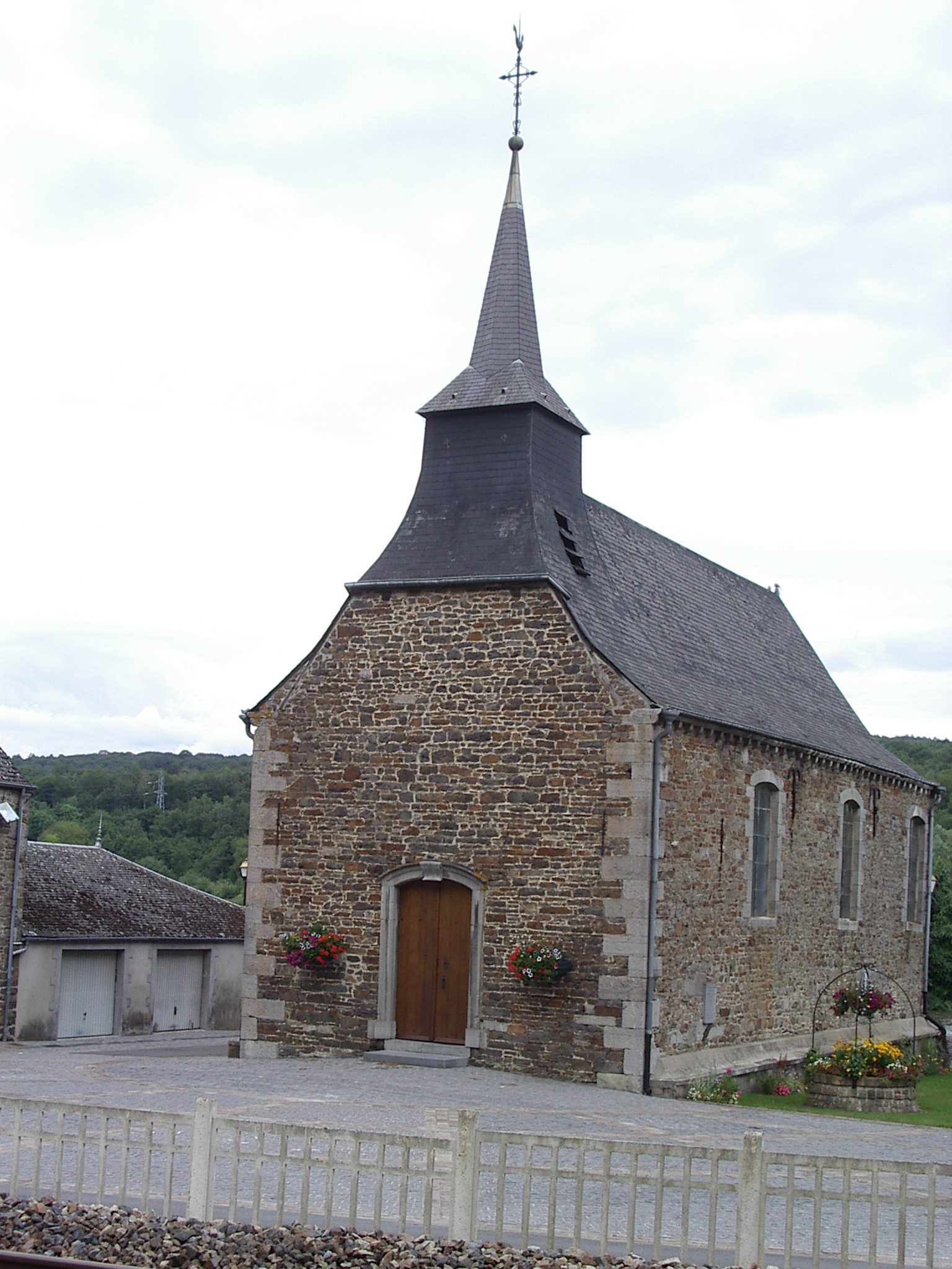 Eglise Saint-Lambert de Montigny sur Meuse, departement des Ardennes, France This building is indexed in the Base Mérimée, a database of architectural heritage maintained by the French Ministry of Culture, under the references PA00078469 and classé.